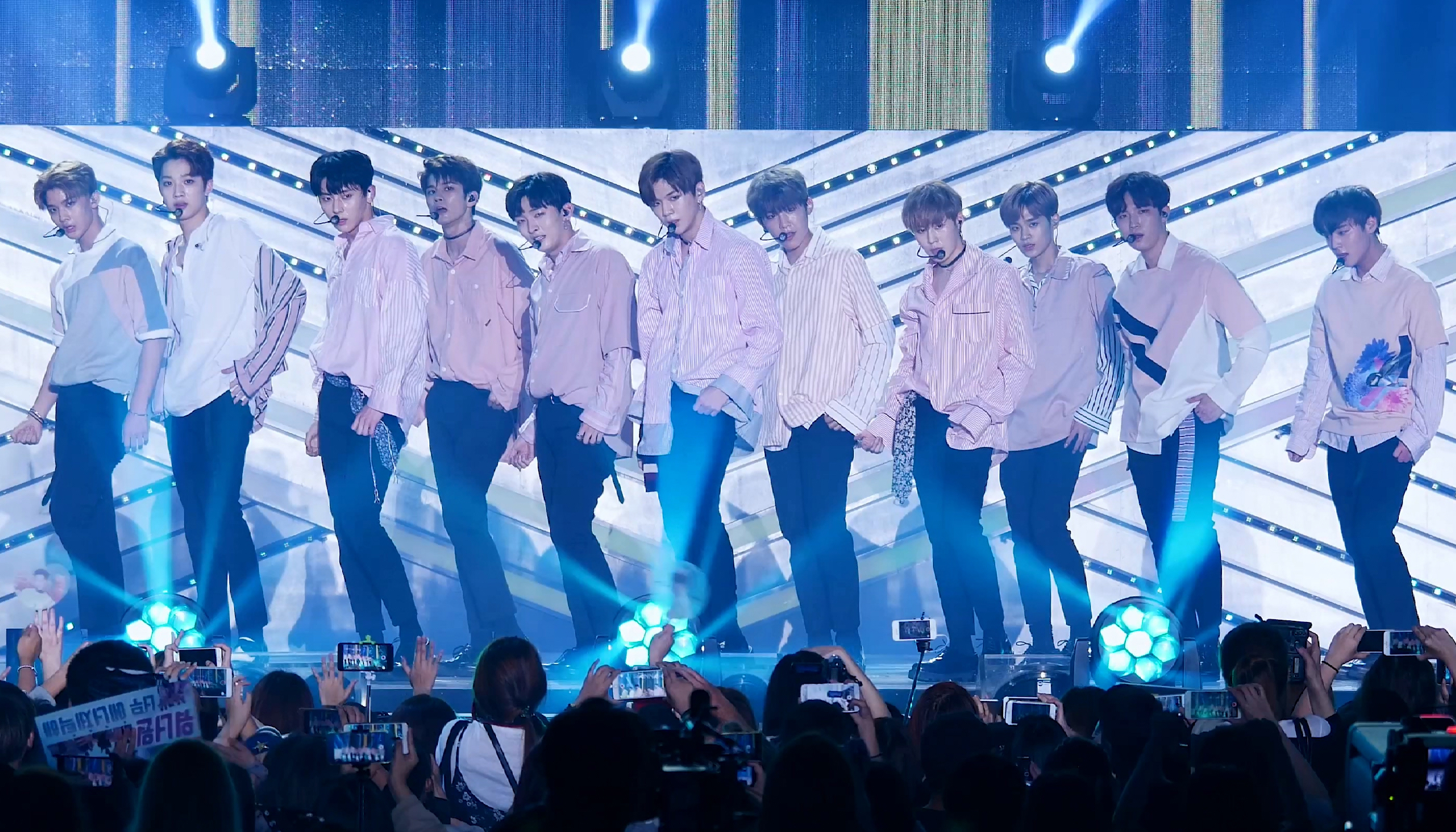 170909 인천한류관광콘서트 - 워너원 '에너제틱' 4K 직캠 by DaftTaengk 3m17s